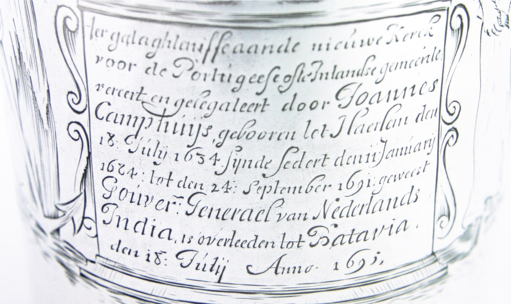 GPIB Paulus